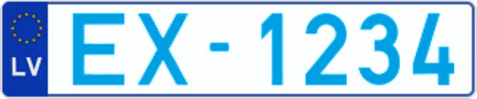 Гос номер выдаваемый электромобилям в Латвии